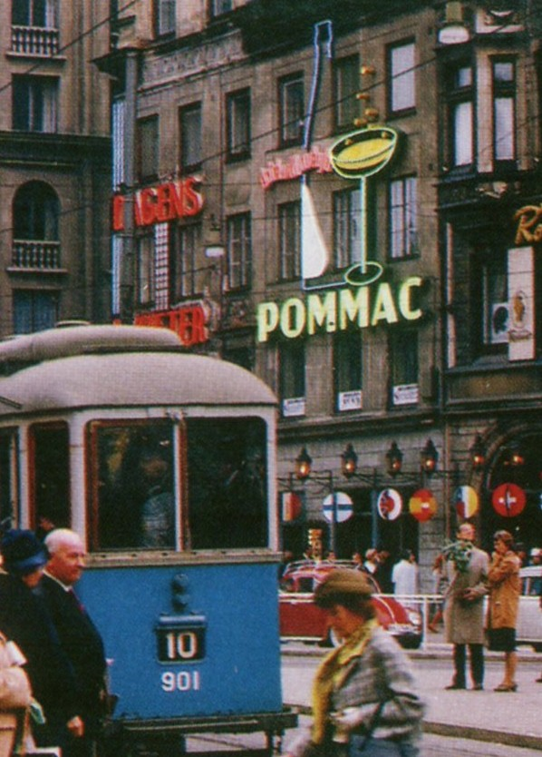 Pommacskylten vid Stureplan i hörnet Biblioteksgatan/Lästmakargatan